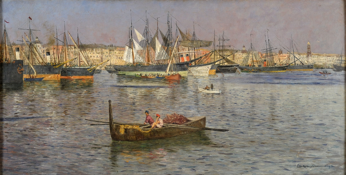 Hafenansicht von Neapel. Signiert und betitelt. Öl auf Leinwand. 80 x 155 cm.